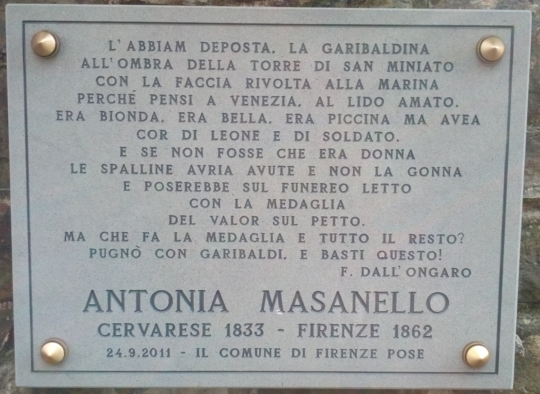 Lapide commemorativa di Antonia Masanello al cimitero San Miniato, Firenze